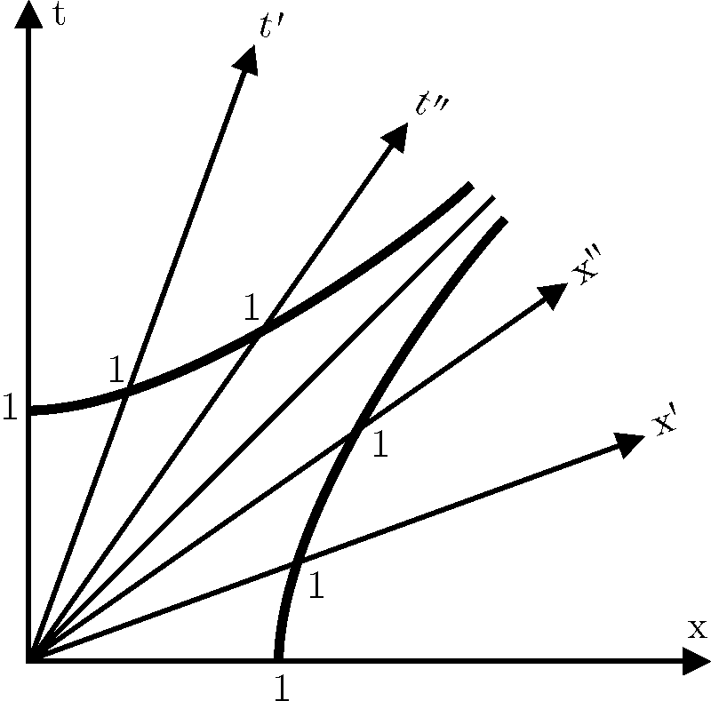 Unit points on spacetime axes